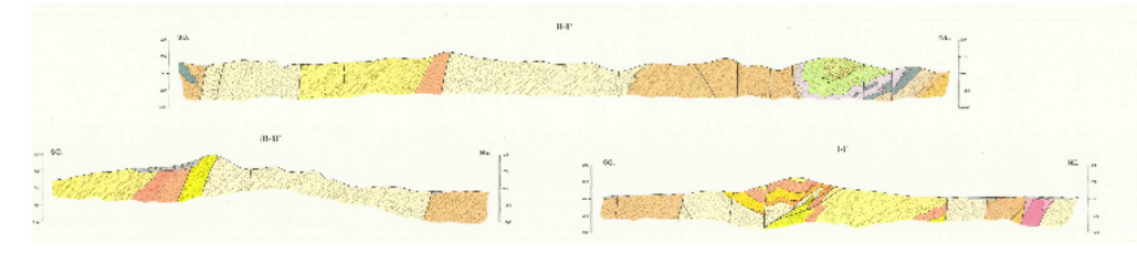 Lezamako zehar ebakia